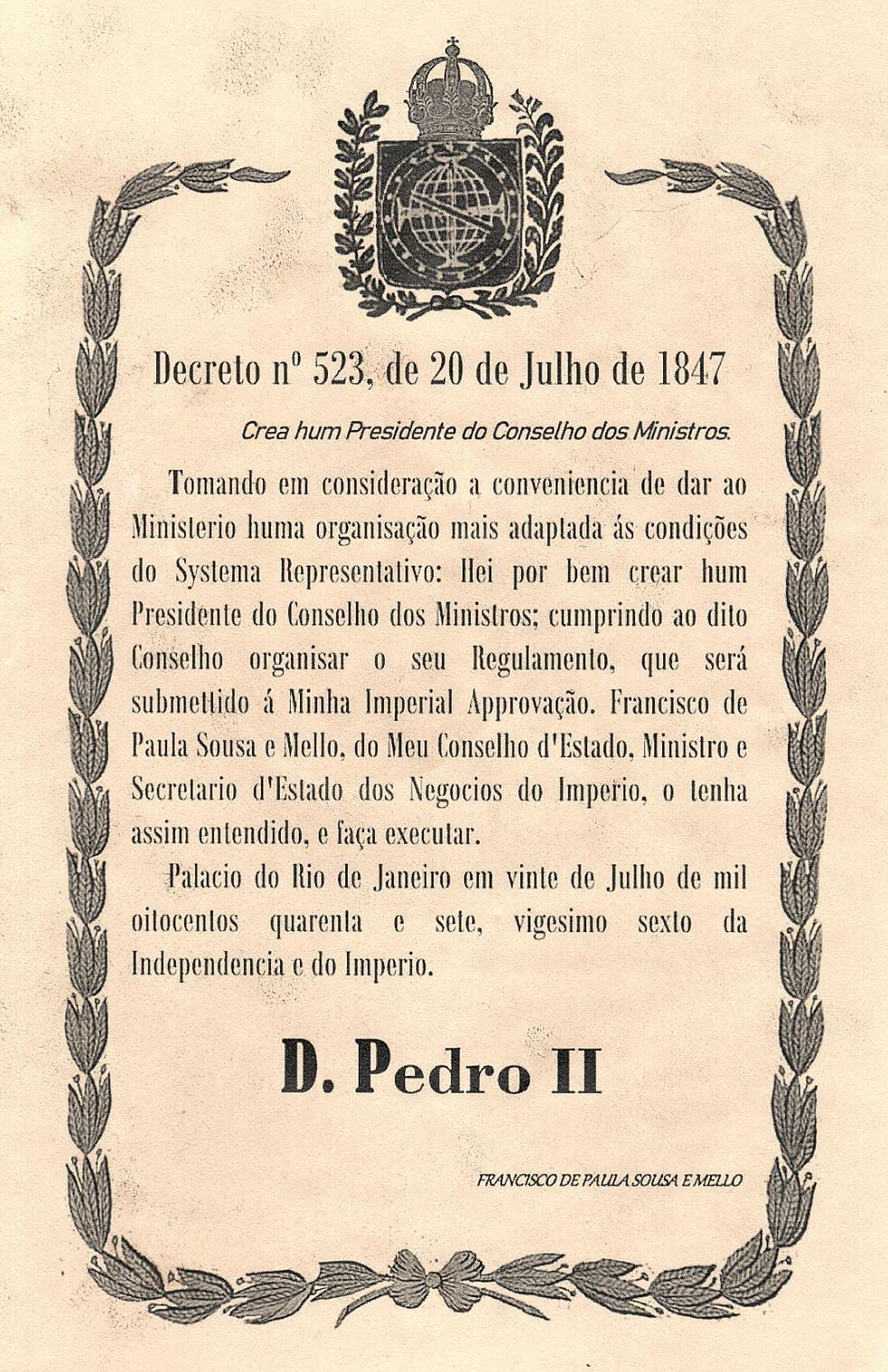 Decreto imperial, em que Dom Pedro II, cria o cargo de Presidente do Conselho de Ministros ( Primeiro-Ministro do Primeiro-Ministro do Império do Brasil).